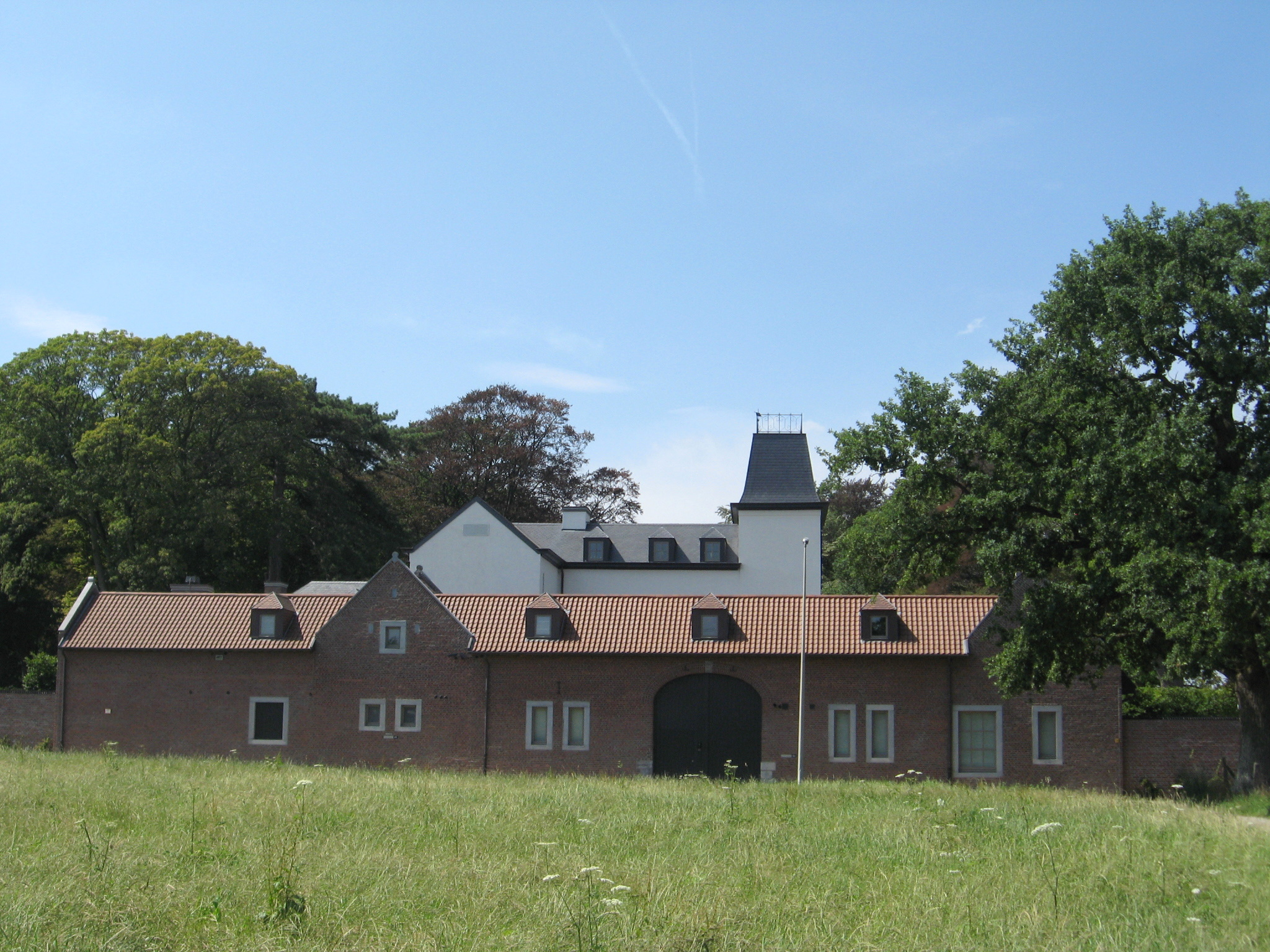 Kasteel van Pietelbeek in Hasselt (witte gebouw achter de Pietelbeekwinning)